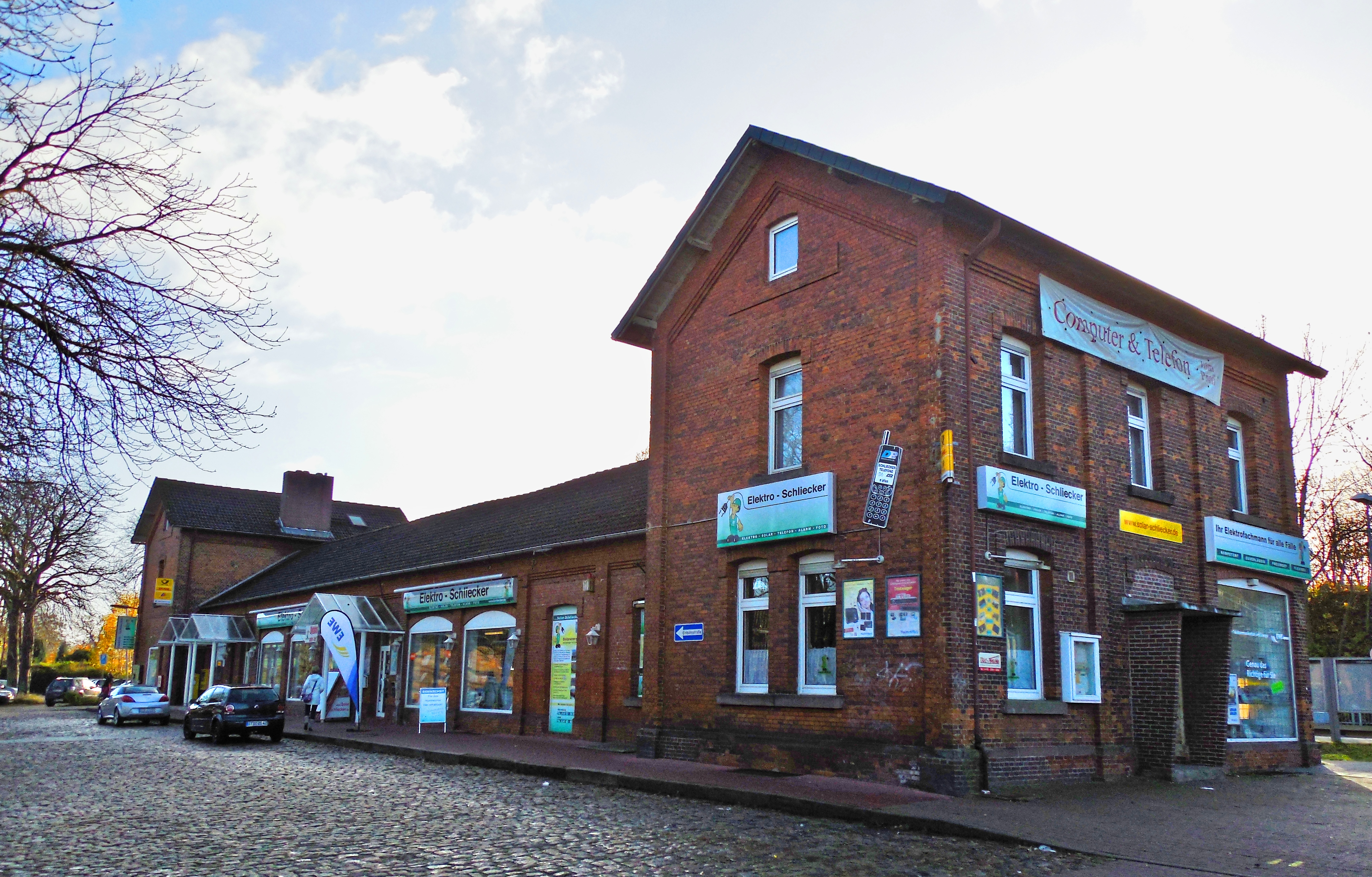 21640 Horneburg, Germany